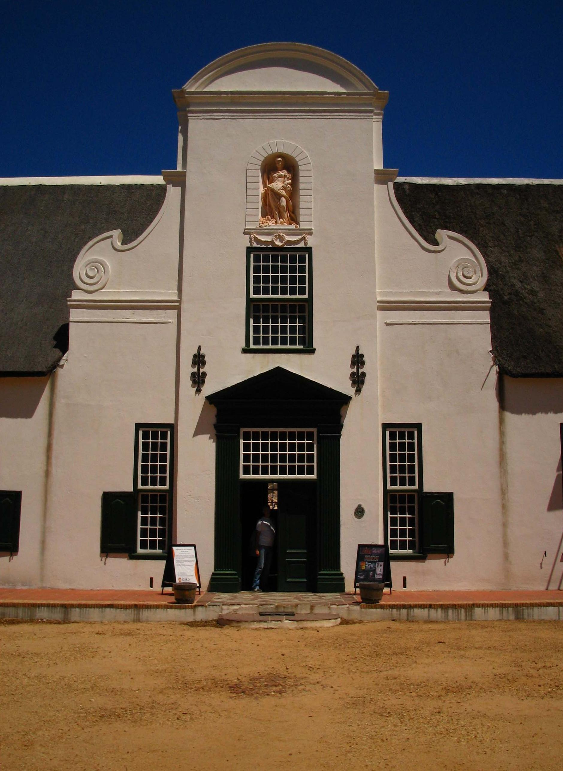 Voorgevel van huis Groot Constantia bij Kaapstad